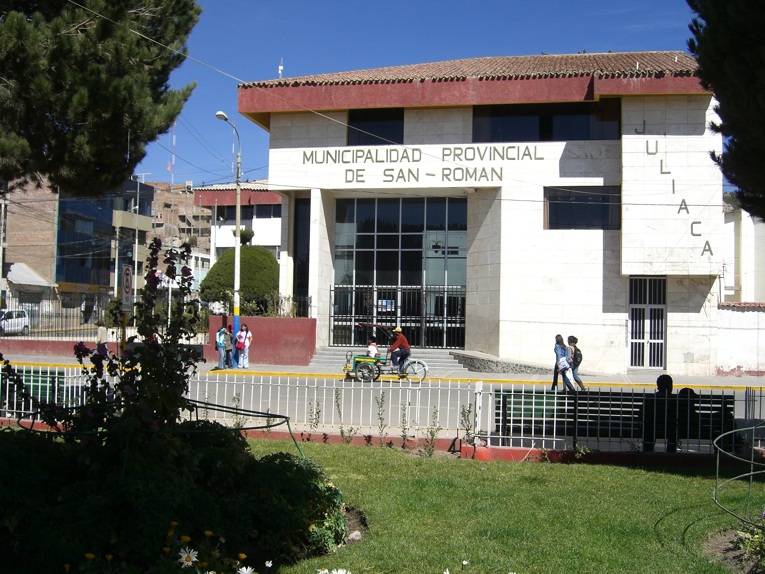 Edificio de la Municipalidad Provincial de San Roman Juliaca ubicado en la Plaza de Armas